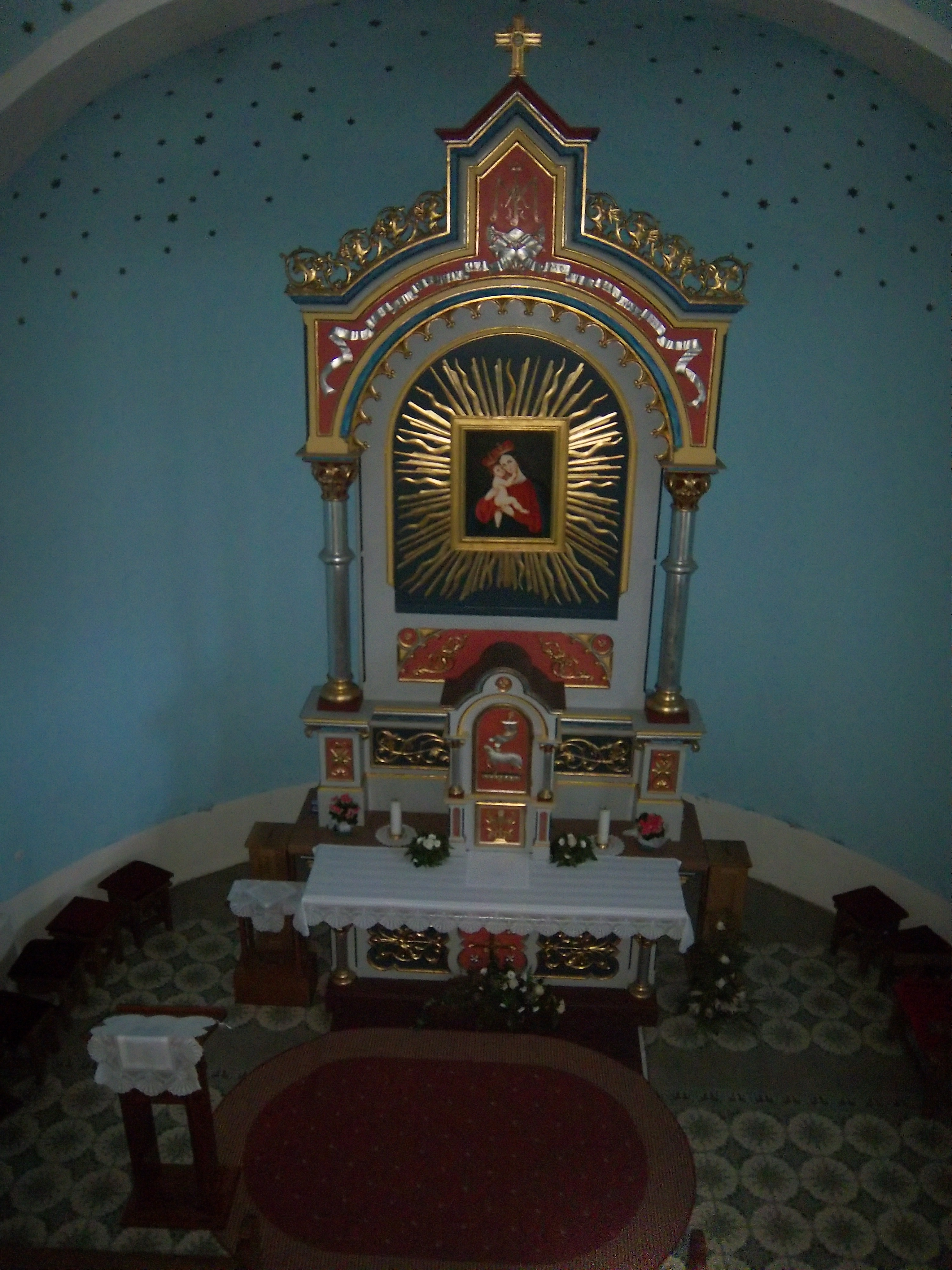 Српски (ћирилица): Светиште Госпе илачке (Република Хрватска)